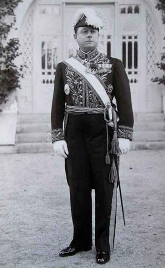 Marcel Peyrouton, résident général de France en Tunisie